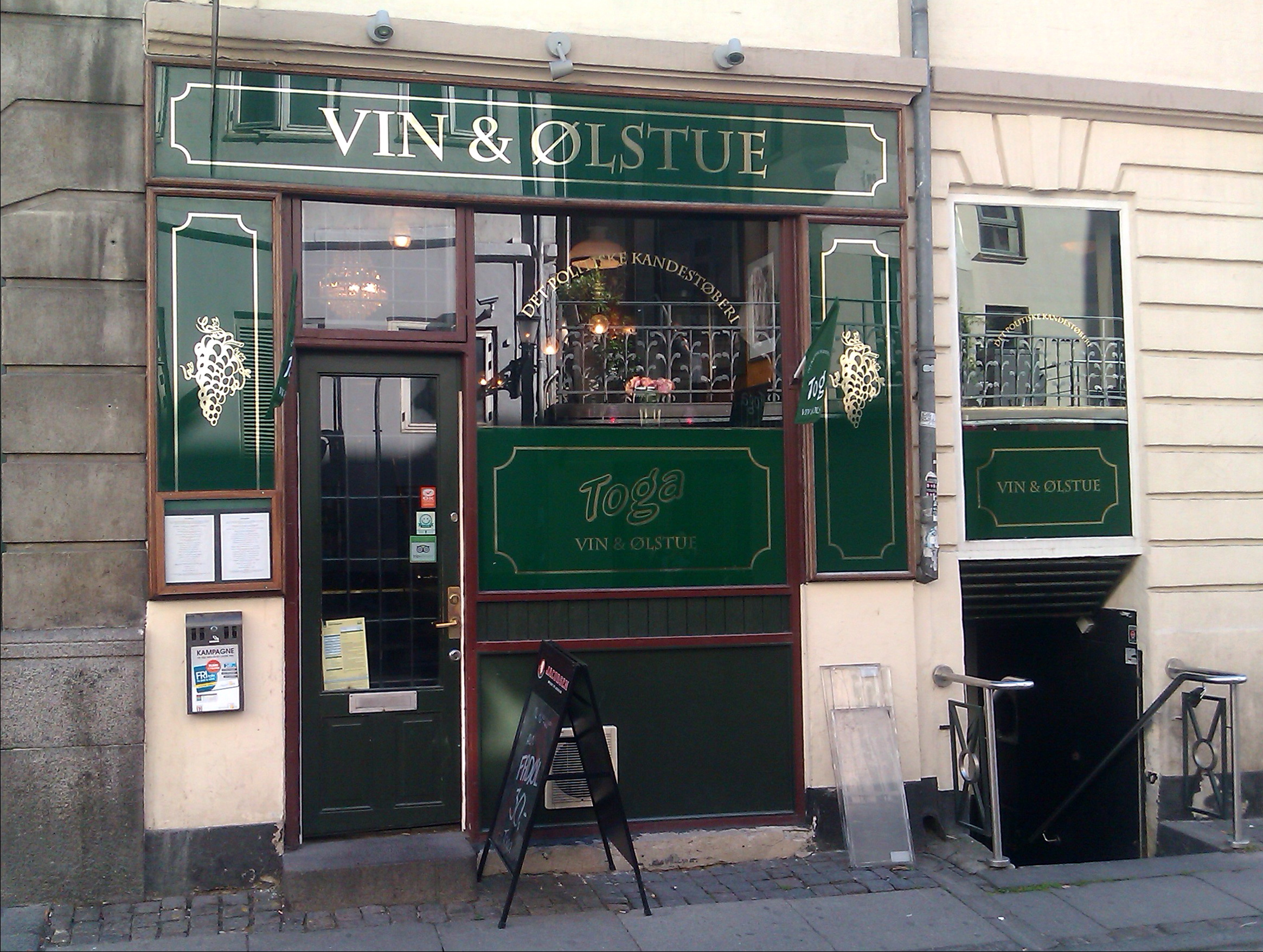 Toga Vin & Ølstue, Det Politiske Kandestøberi, Store Kirkestræde, København